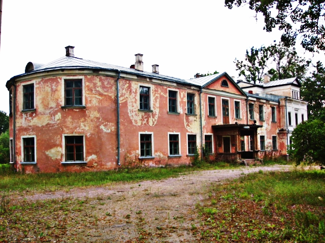 Abja mõisa peahoone